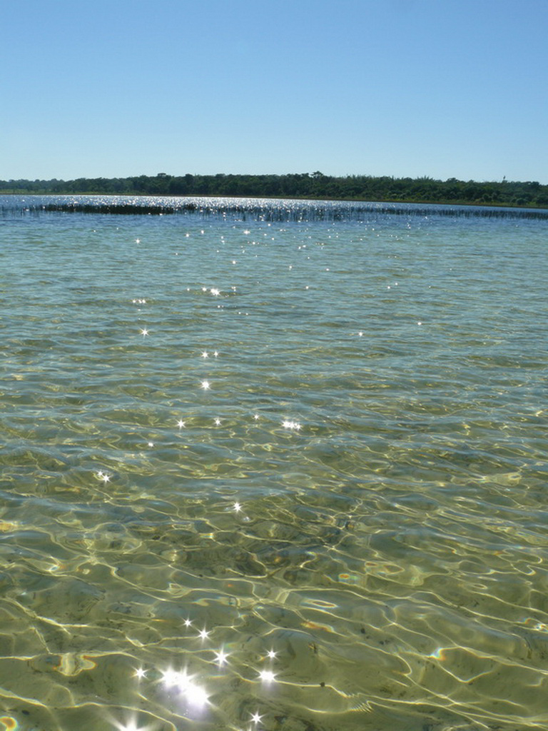 Fotos de los refugios y reservas de Itaipu, tomadas en los años 2007 y 2008 por mí